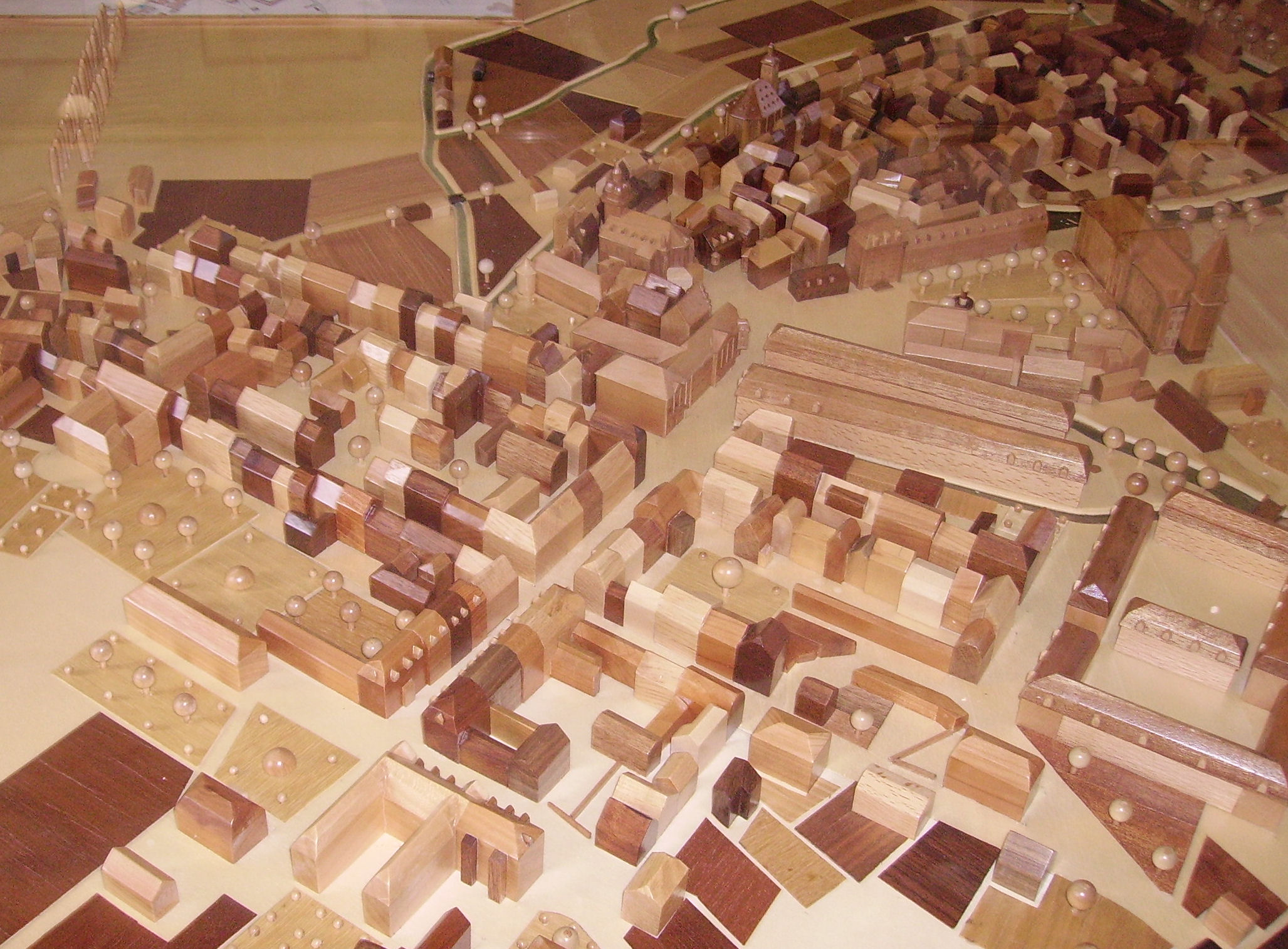 view of Zweibrücken, Germany